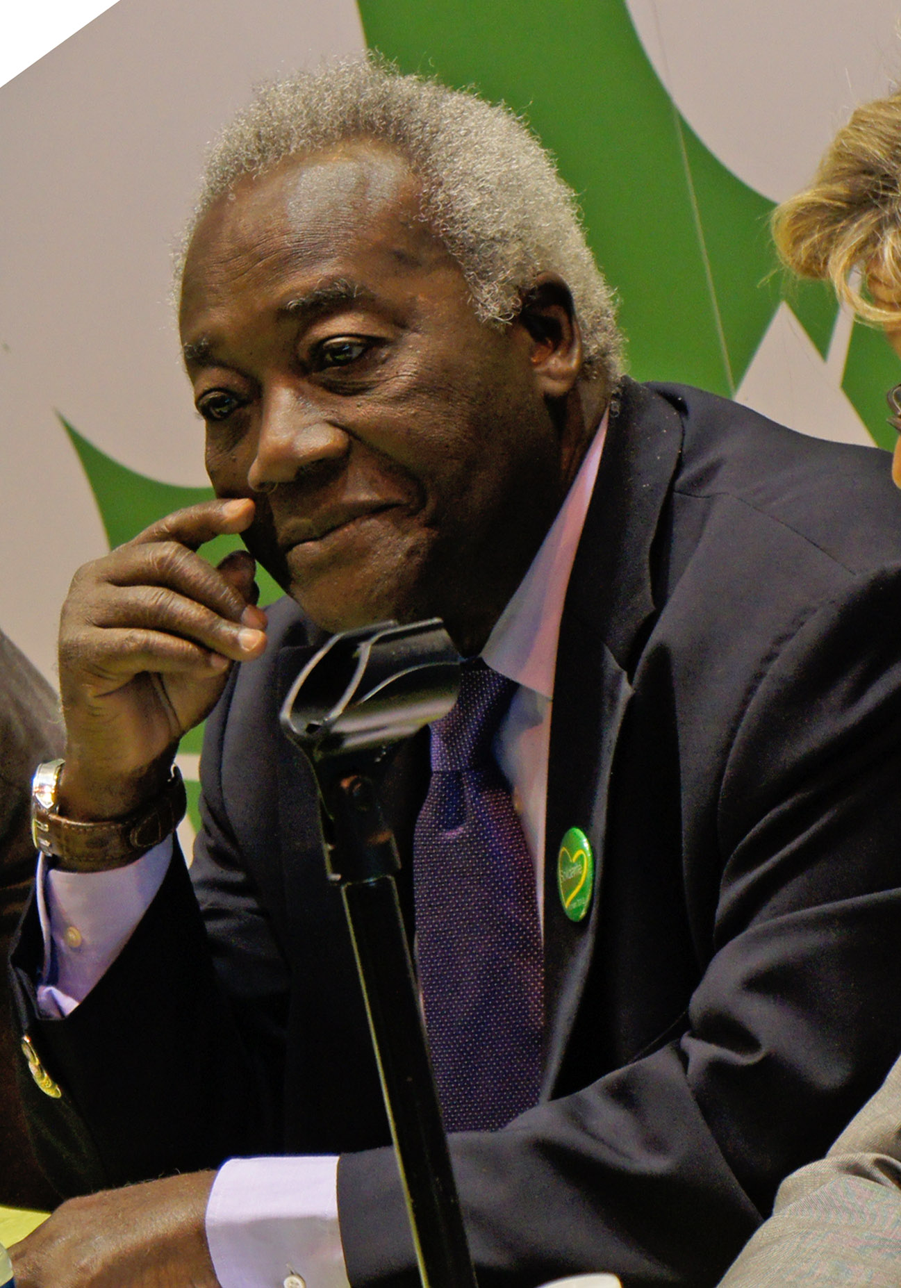 Stanislas Adotevi au salon du livre 2012.